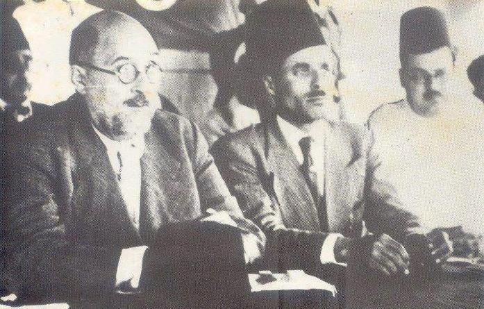 De droite à gauche A.TAALBI, H.BOURGUIBA et TAHAR SFAR